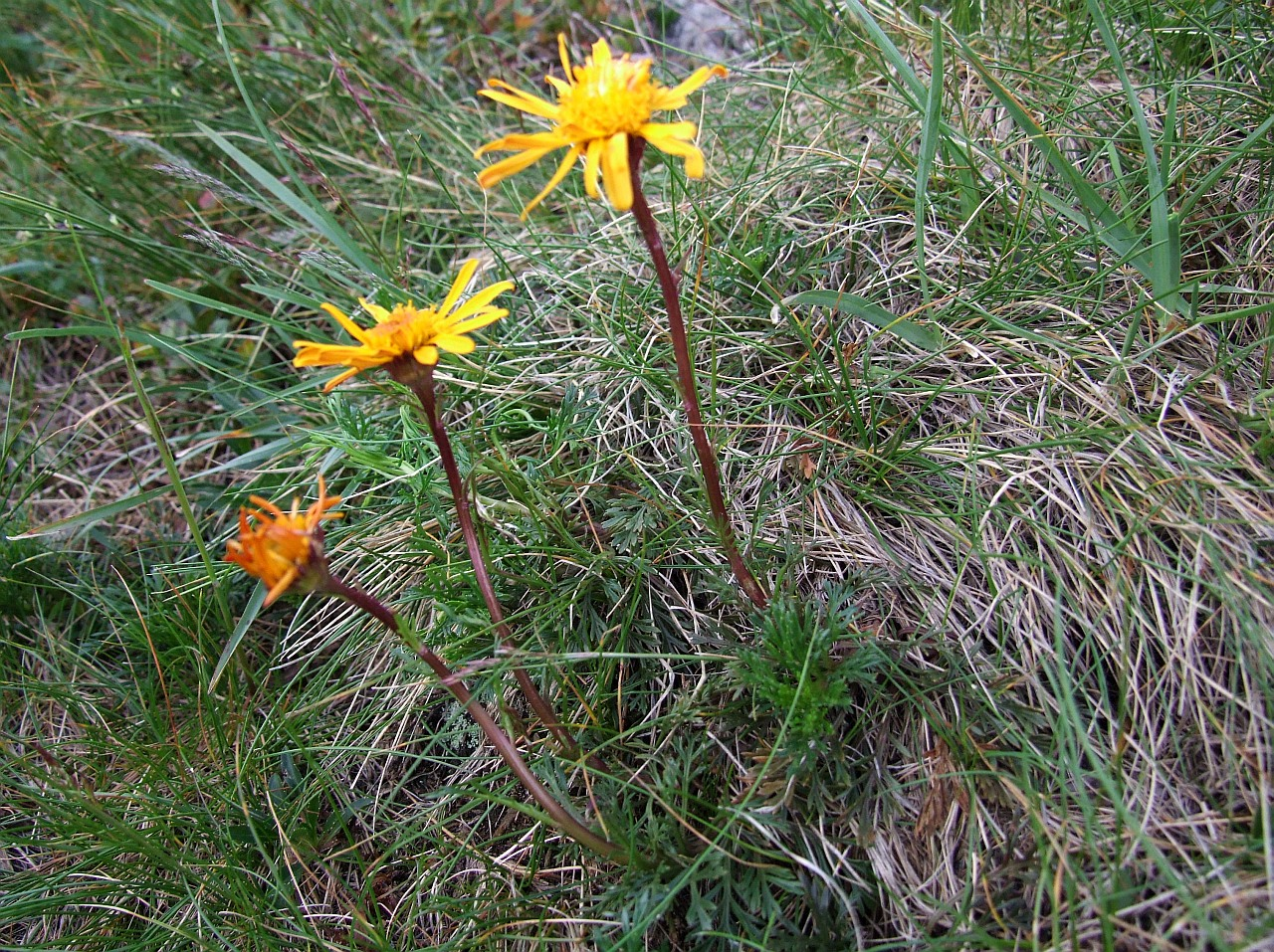 Senecio carpaticus (habitat:Tatra Mountains, Rakuska Przełęcz)